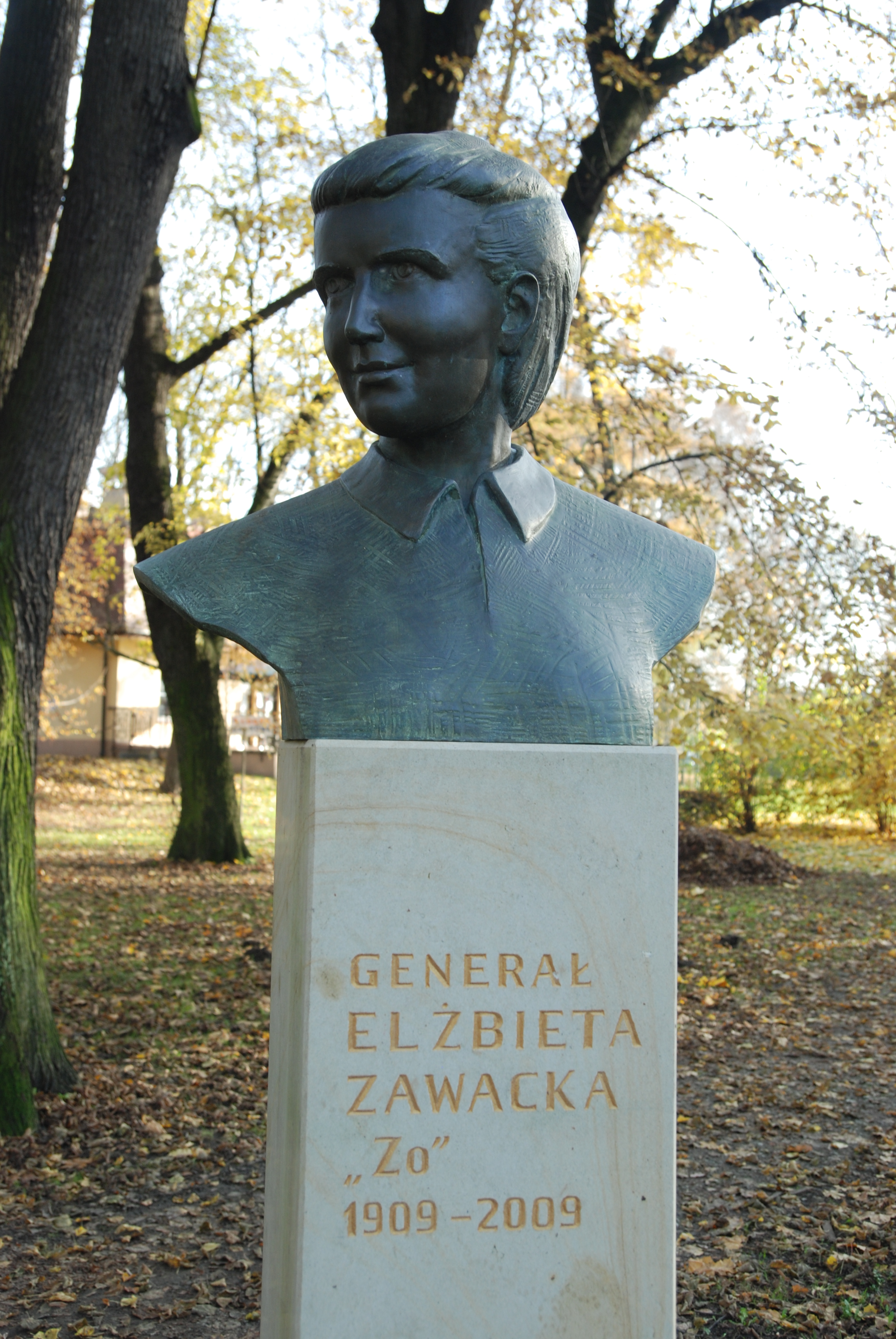 Popiersie gen. Elżbiety Zawackiej w krakowskim Parku Jordana